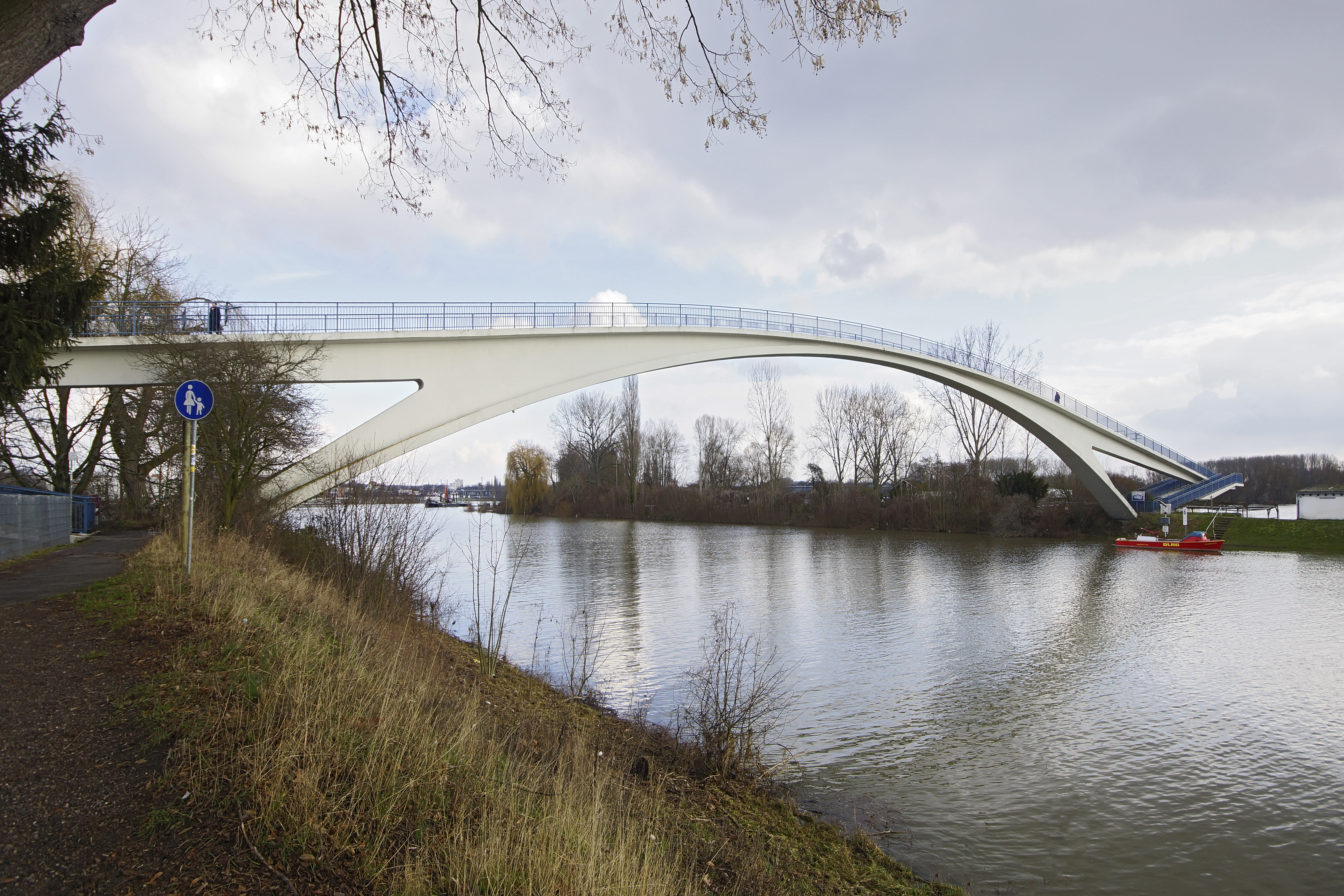 Dyckerhoff-Brücke im Schiersteiner Hafen in Wiesbaden-Schierstein am 09.02.2013